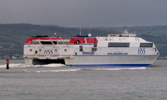 'Stena Voyager' leaving Belfast